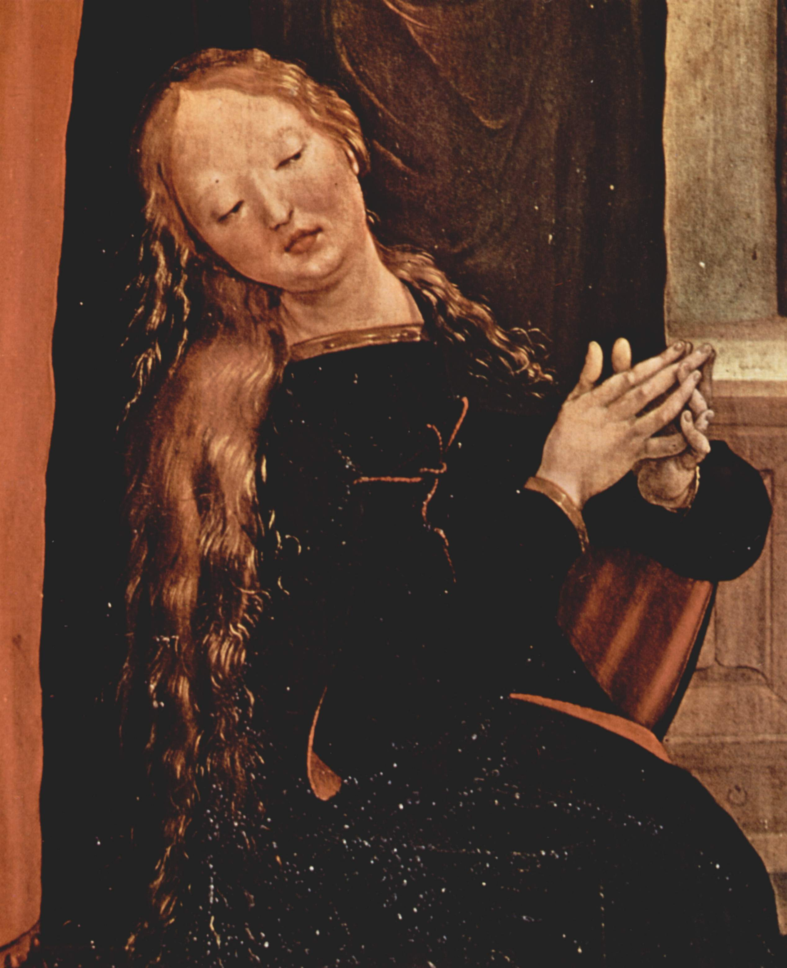 detail: Maria